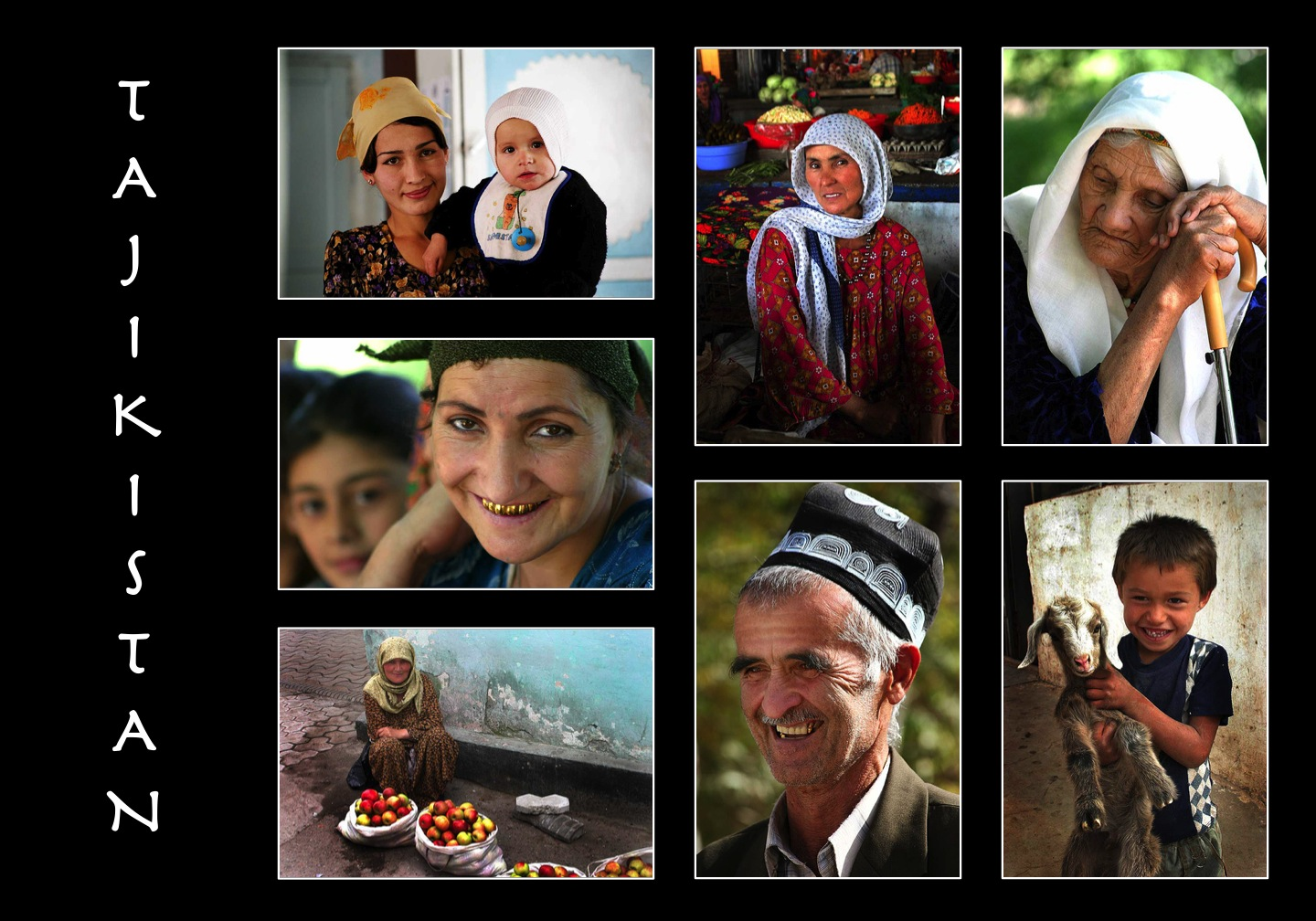 Tajikistan